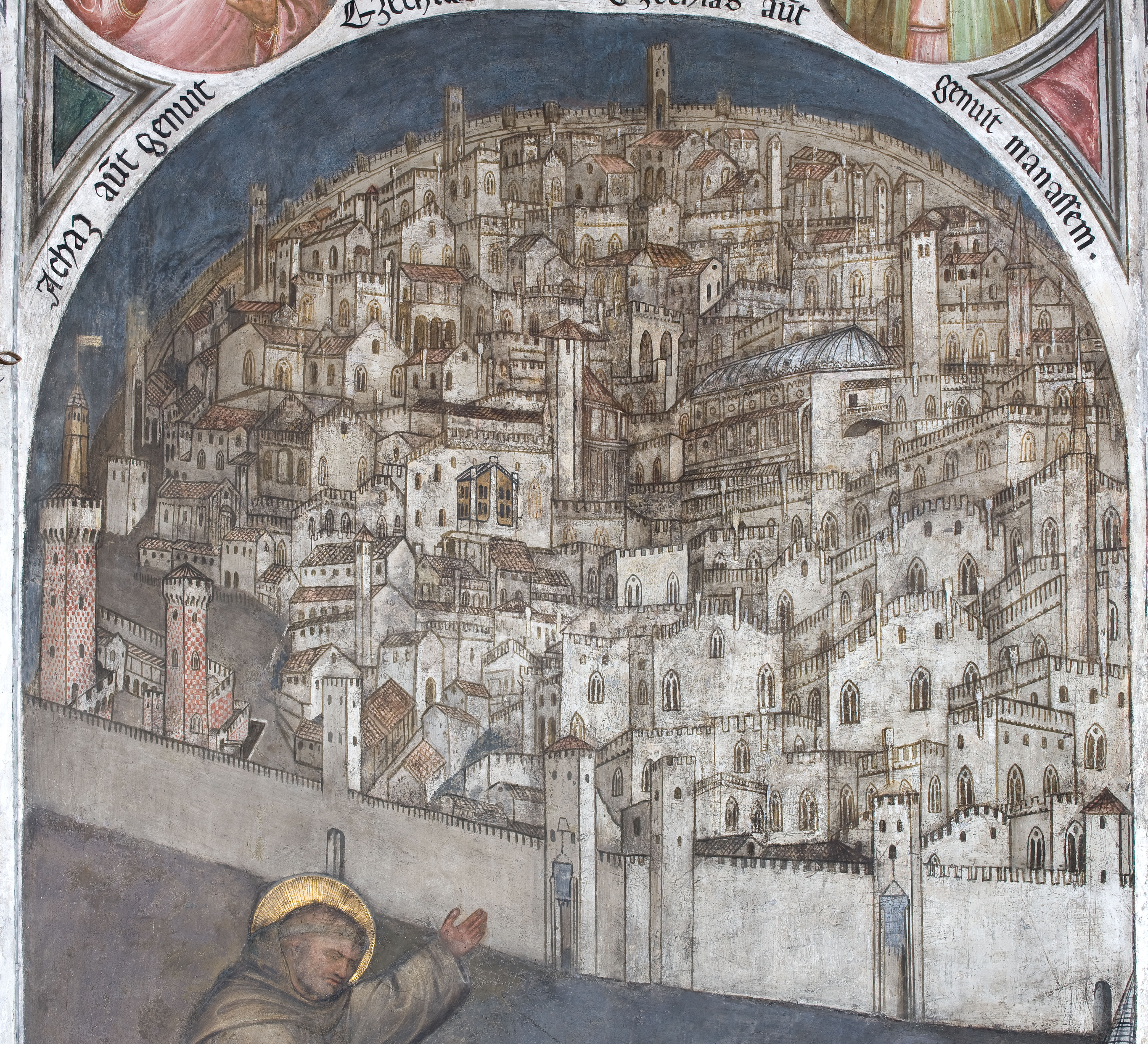 Veduta di Padova nel trecento - Basilica di Sant Antonio